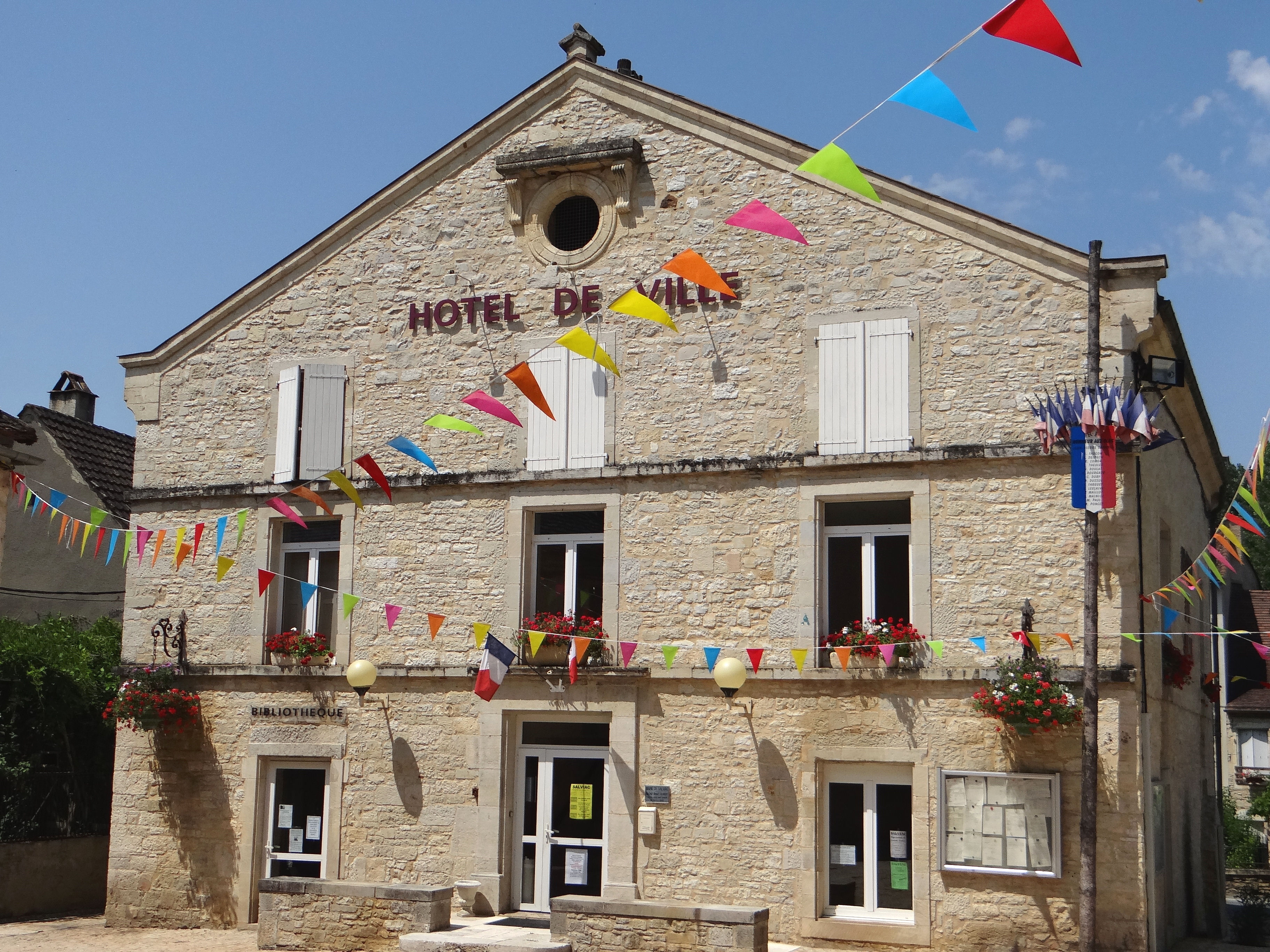 Salviac - Hôtel de ville